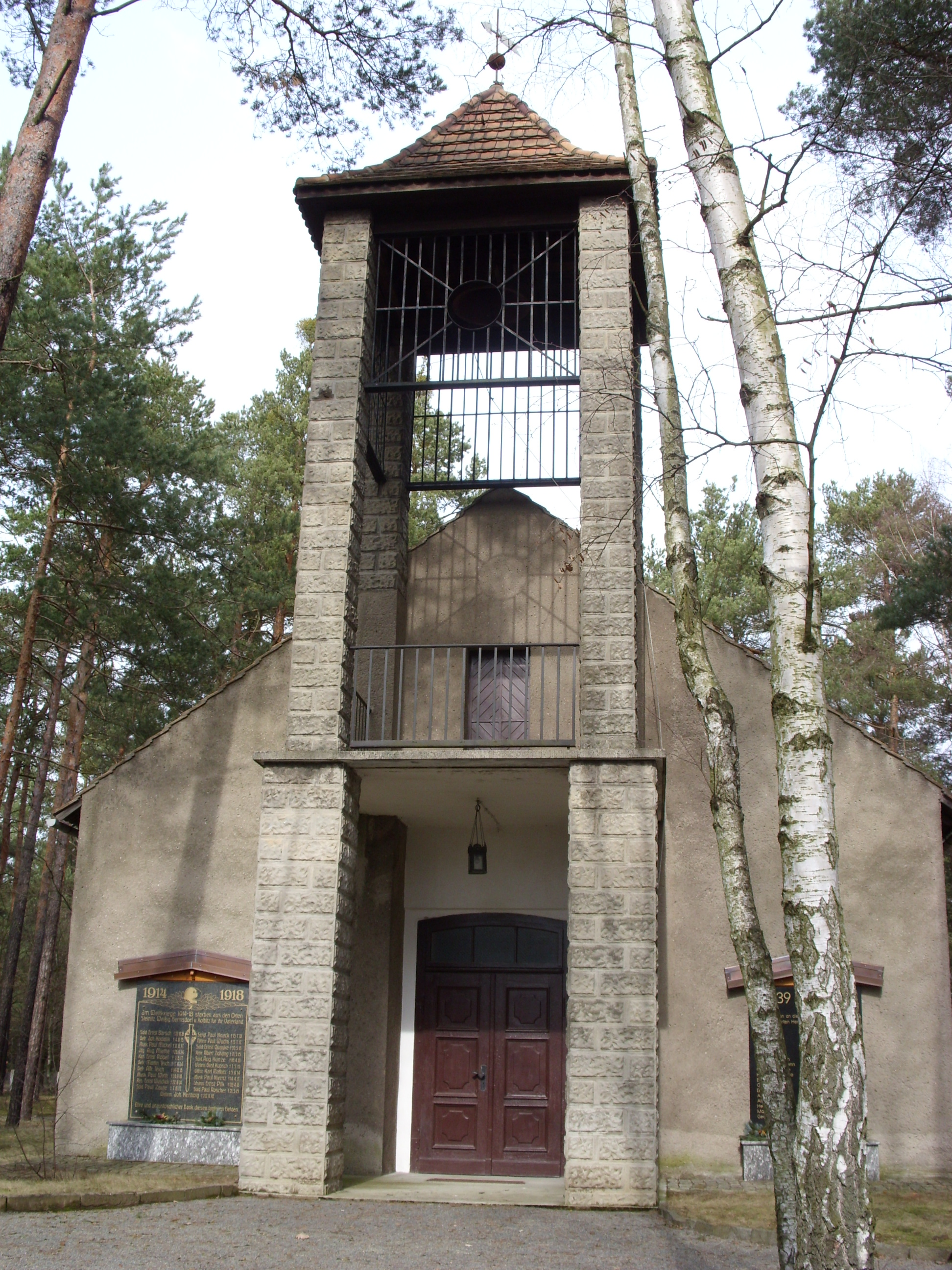 Die Kapelle in Hermsdorf/Spree, Gemeinde Lohsa, Landkreis Bautzen. Hornjoserbsce: Kapała w Hermanecach, gmejna Łaz, wokrjes Budyšin.